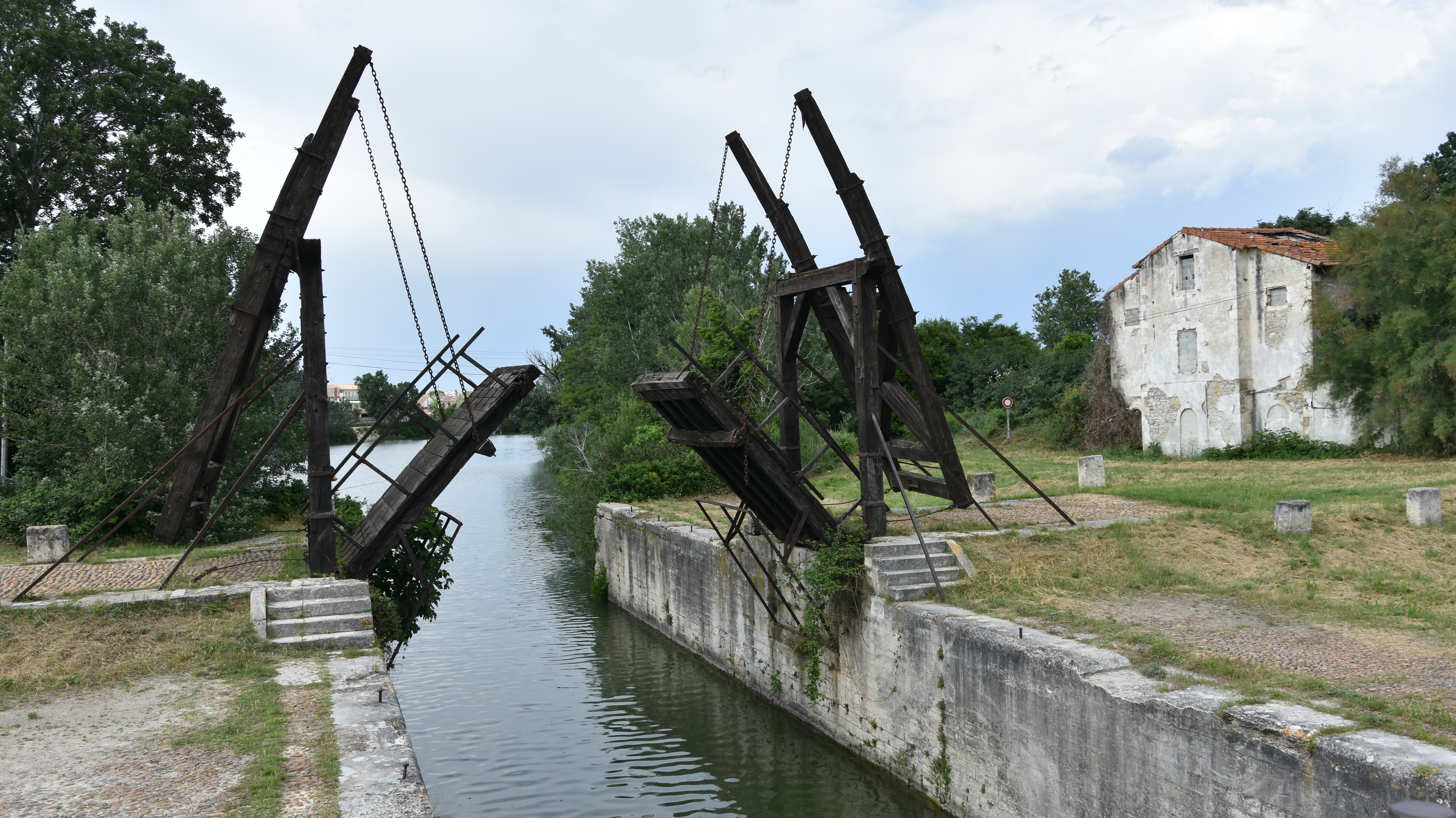 Brug van van Gogh te Arles 23-05-2018 17-08-00